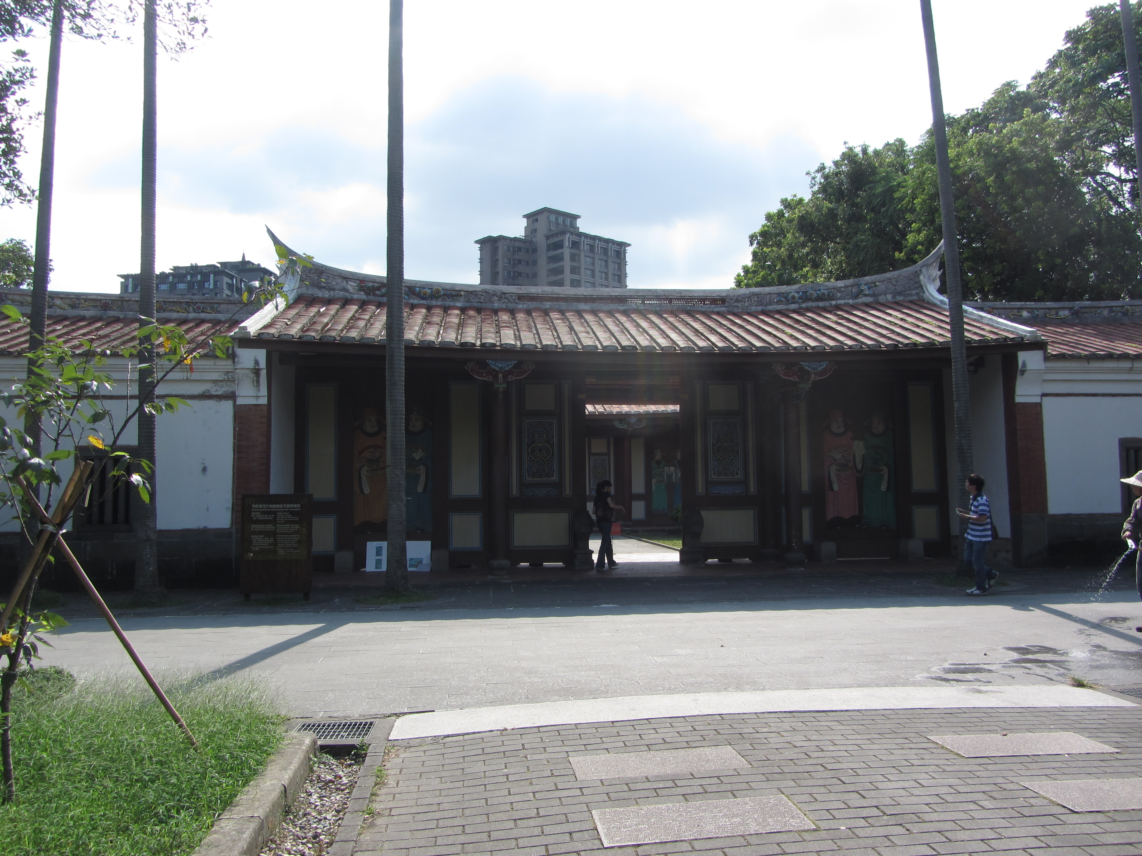 欽差行臺，攝於2013年